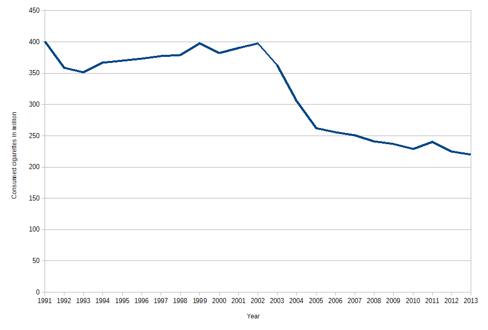 Zigarettenkonsum nach Jahr in Millionen.